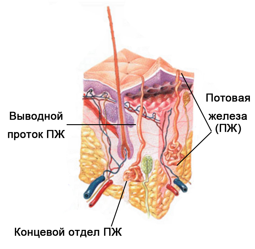 Потовые железы в коже